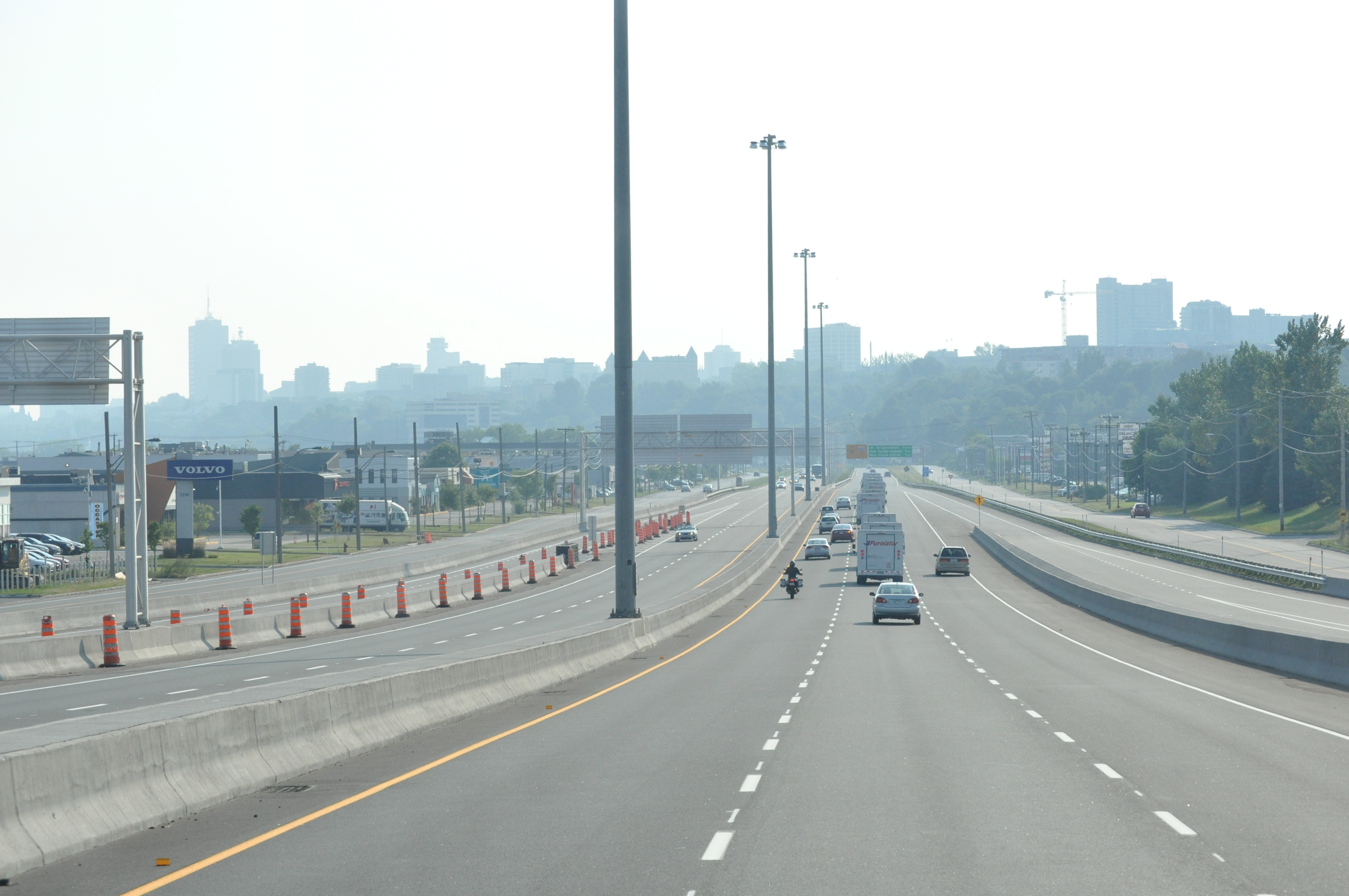 Autoroute Charest, Québec, 2012. View to the east.